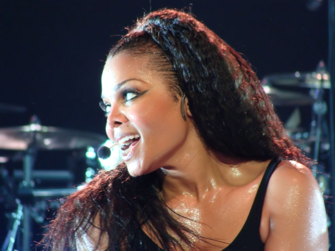 70 - Janet Jackson - Royal Albert Hall 2-7-2011